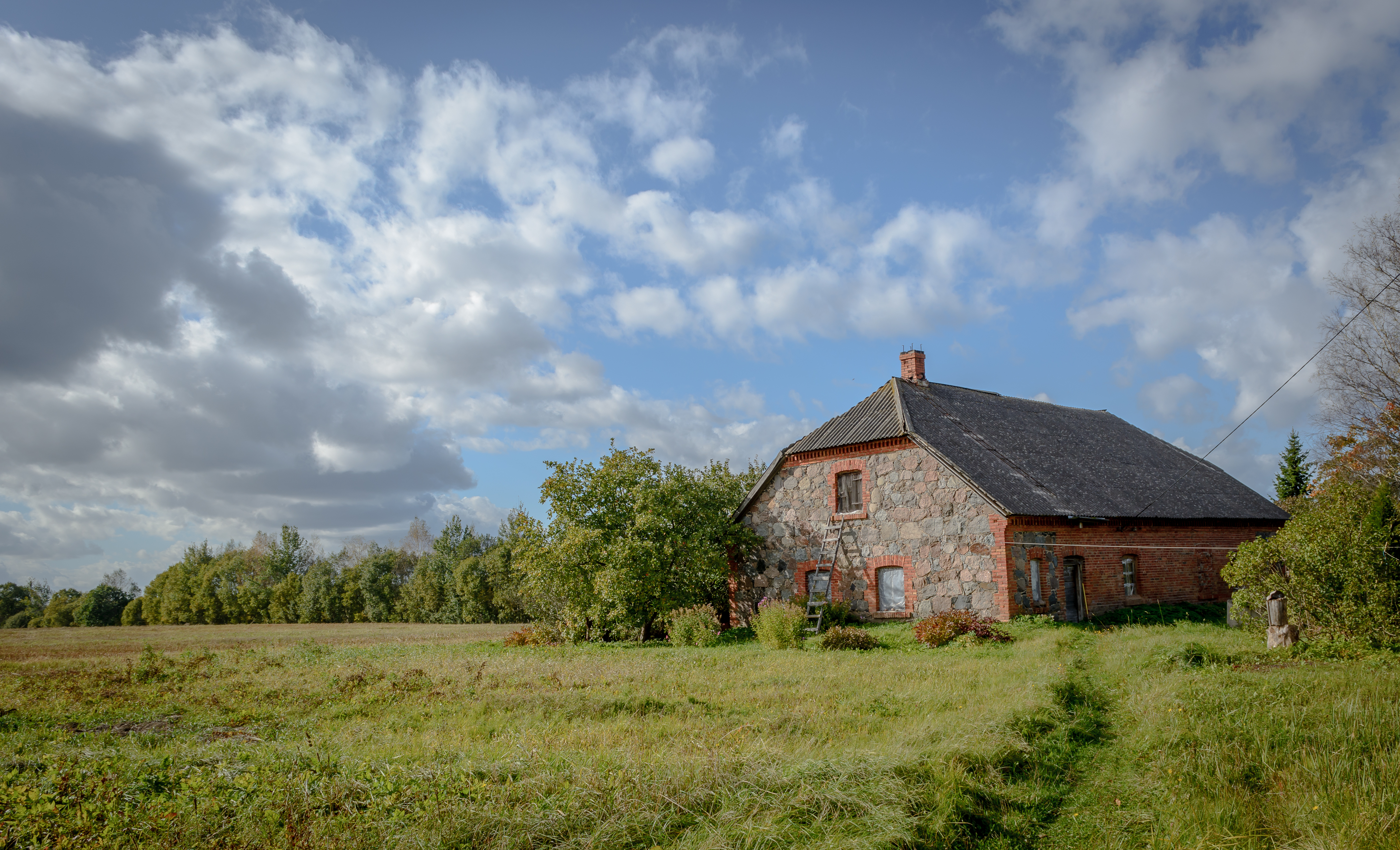 Põlgaste mõisa moonakatemaja 2